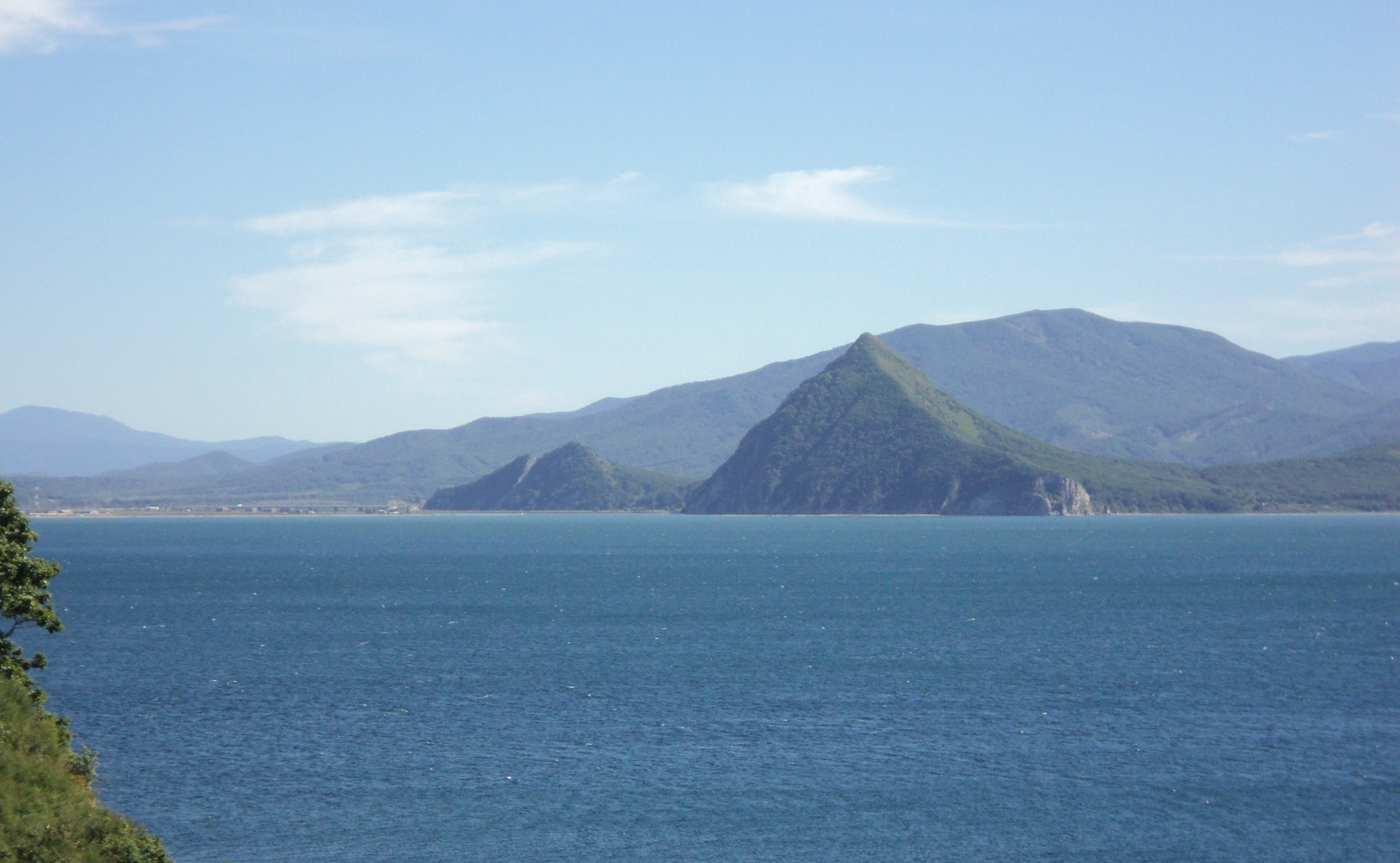 Гора Сестра - природный символ Находки